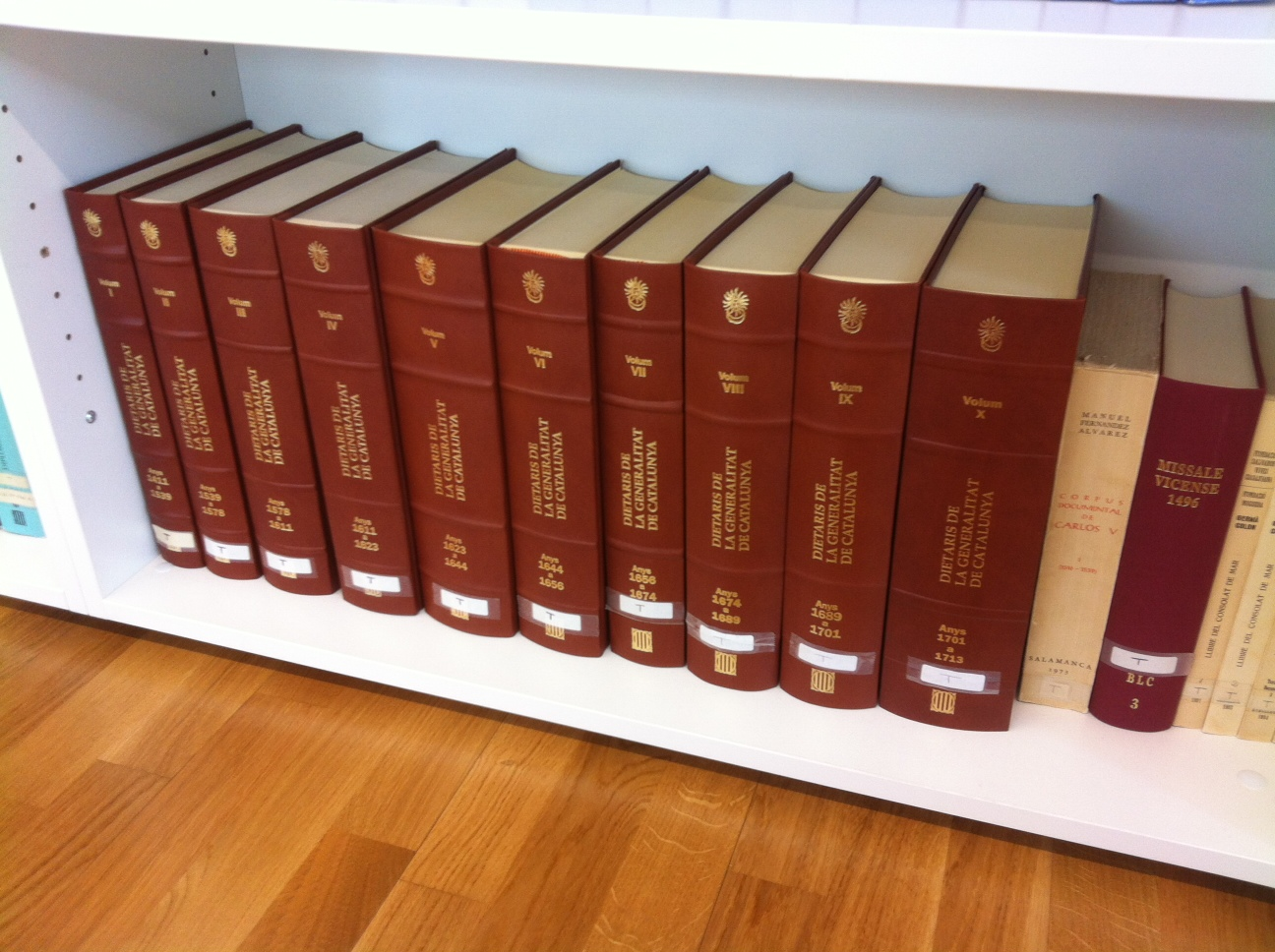 Arxiu de Terrassa